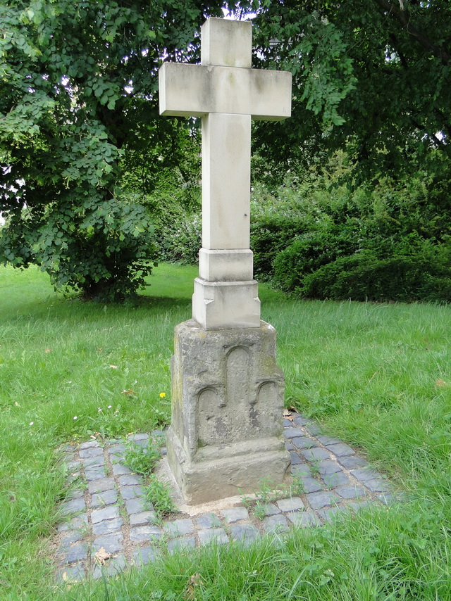 Das Wegekreuz ohne Inschrift und Jahreszahl befindet sich an der Ecke Abt- und Fabristraße. Das Kreuz wurde 1920 errichtet. Um 1960 neu errichtet und 2006 transloziert. Inschrift: keine